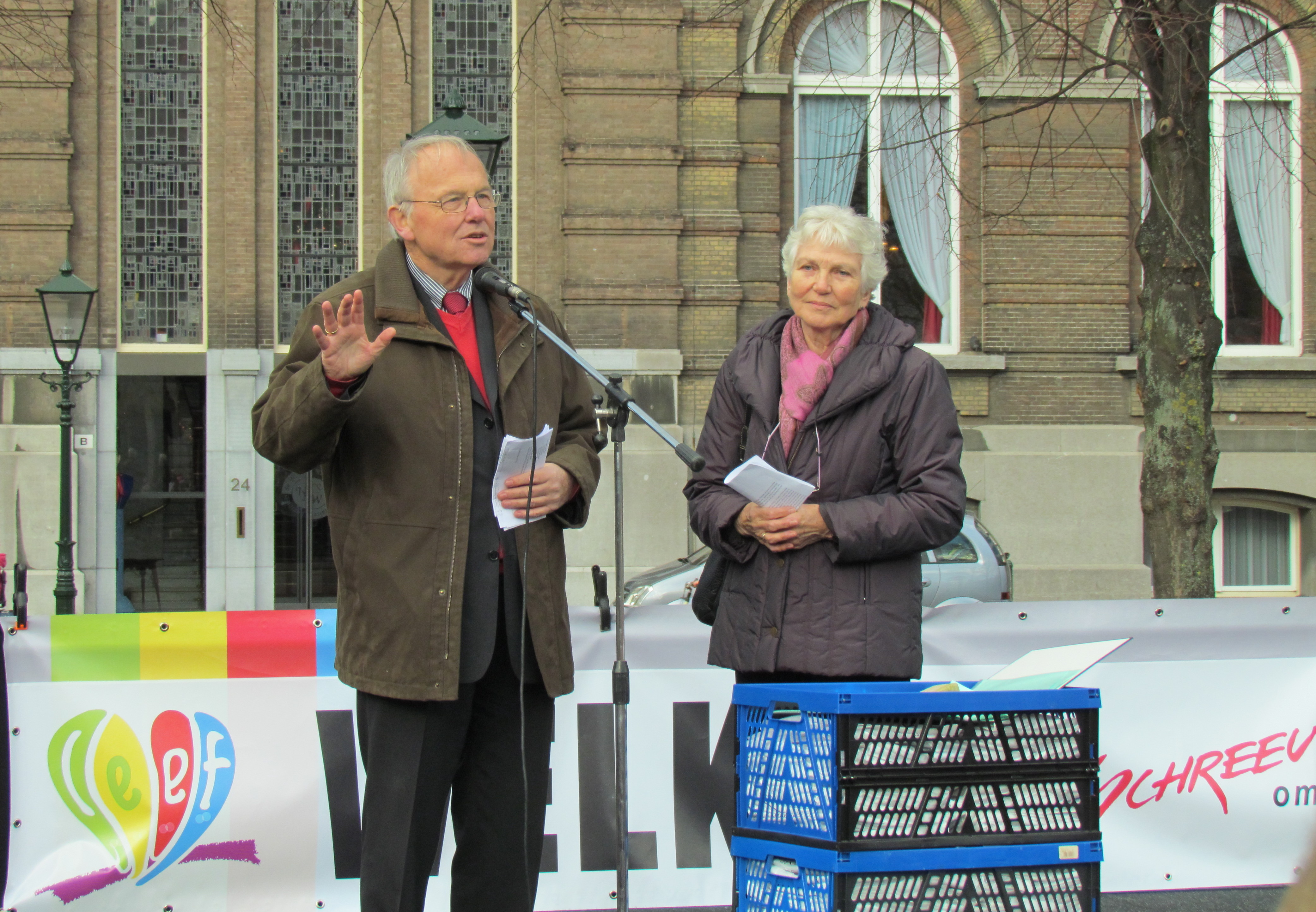 Bert Dorenbos en Willy Dorenbos-de Lange houden een toespraak bij de manifestatie 'Mars voor het Leven' van hun stichting Schreeuw om Leven op het Plein in Den Haag